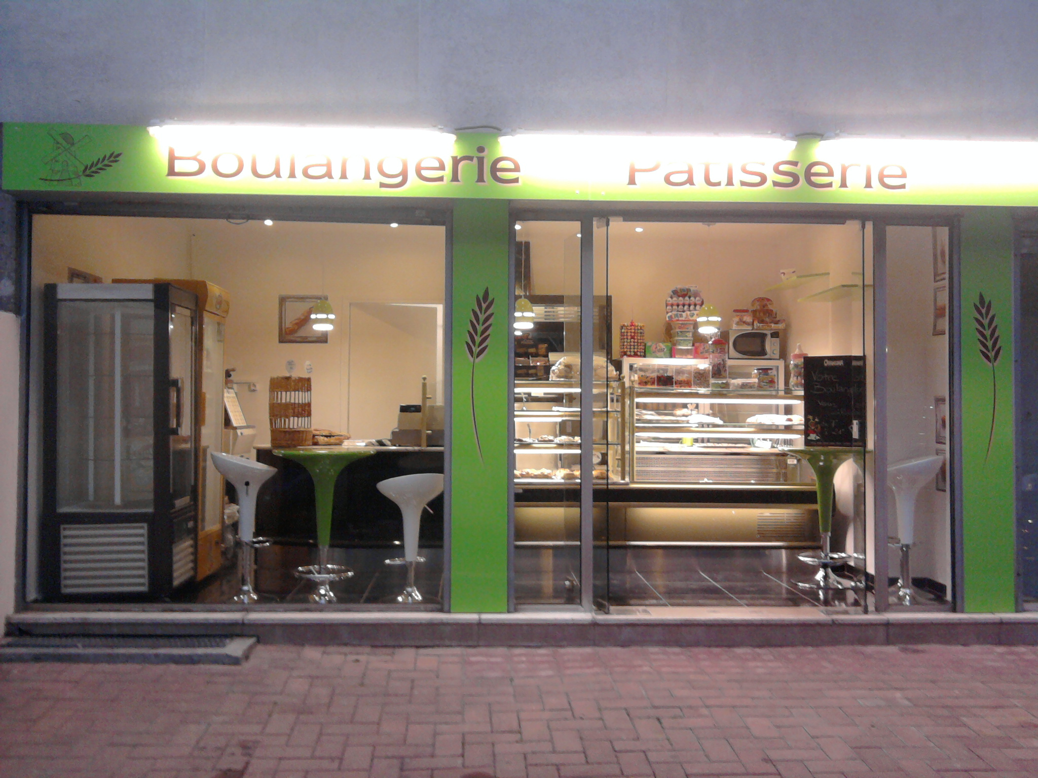 BOULANGERIE PÂTISSERIE ARTISANALES